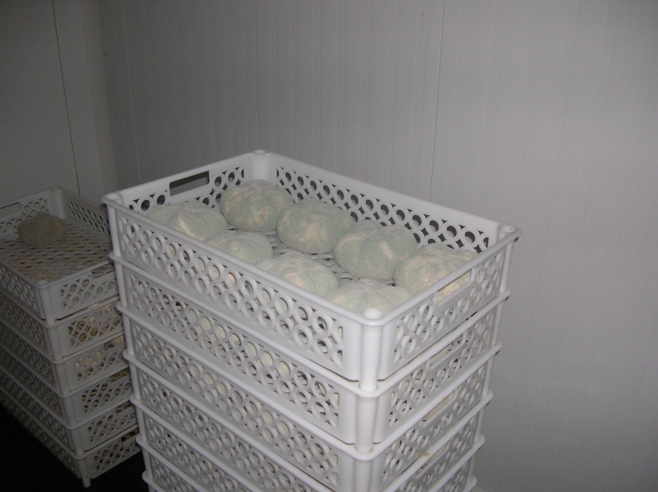 Peces de formatge en procés de curat